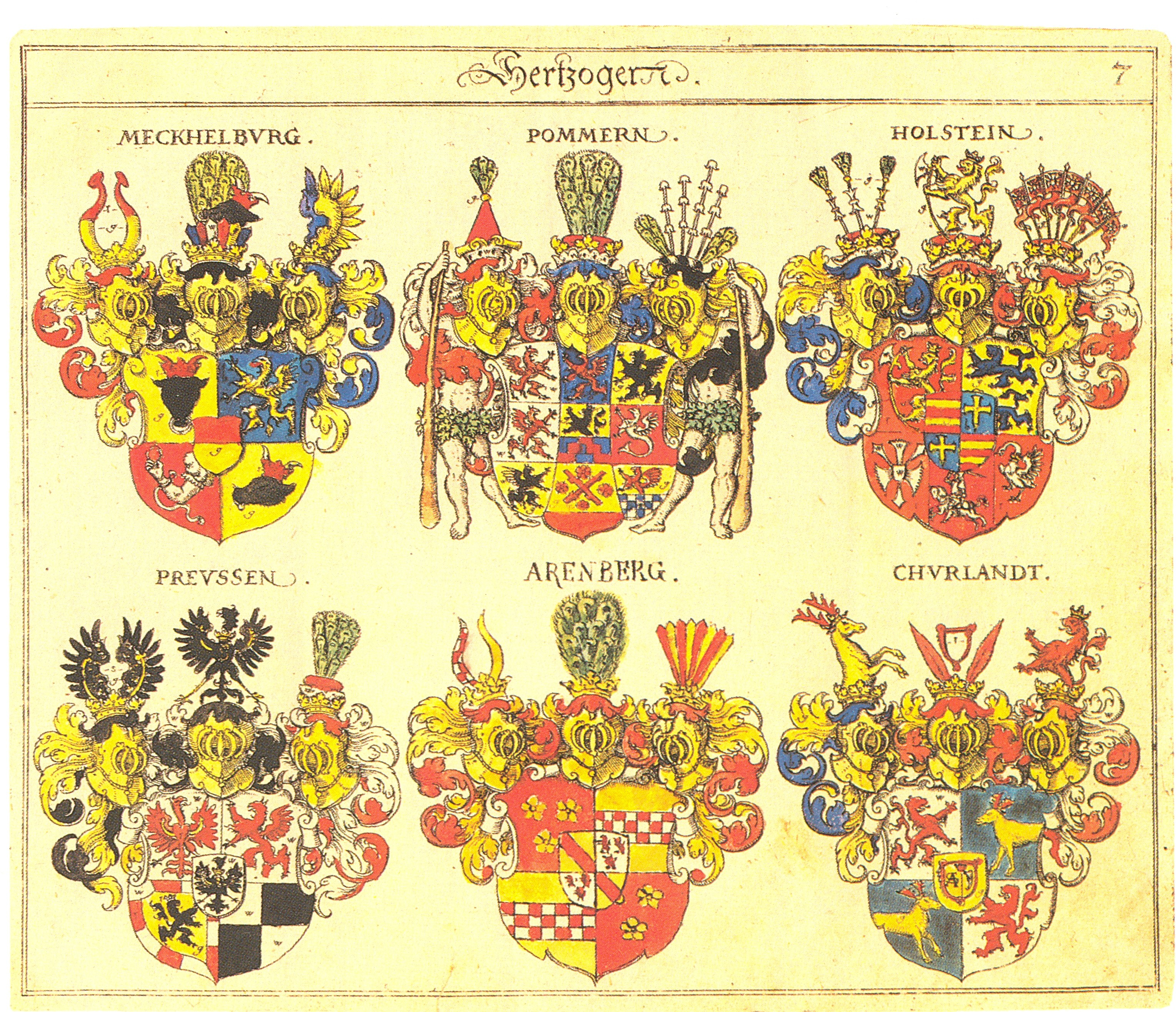 Johann Siebmacher: New Wappenbuch Herzöge Blatt 7